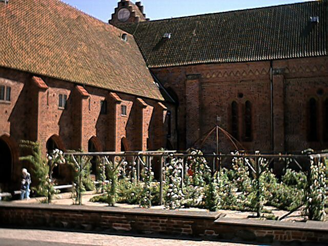 Gråbrödrakloster i Ystad. Fotograf: Väsk.